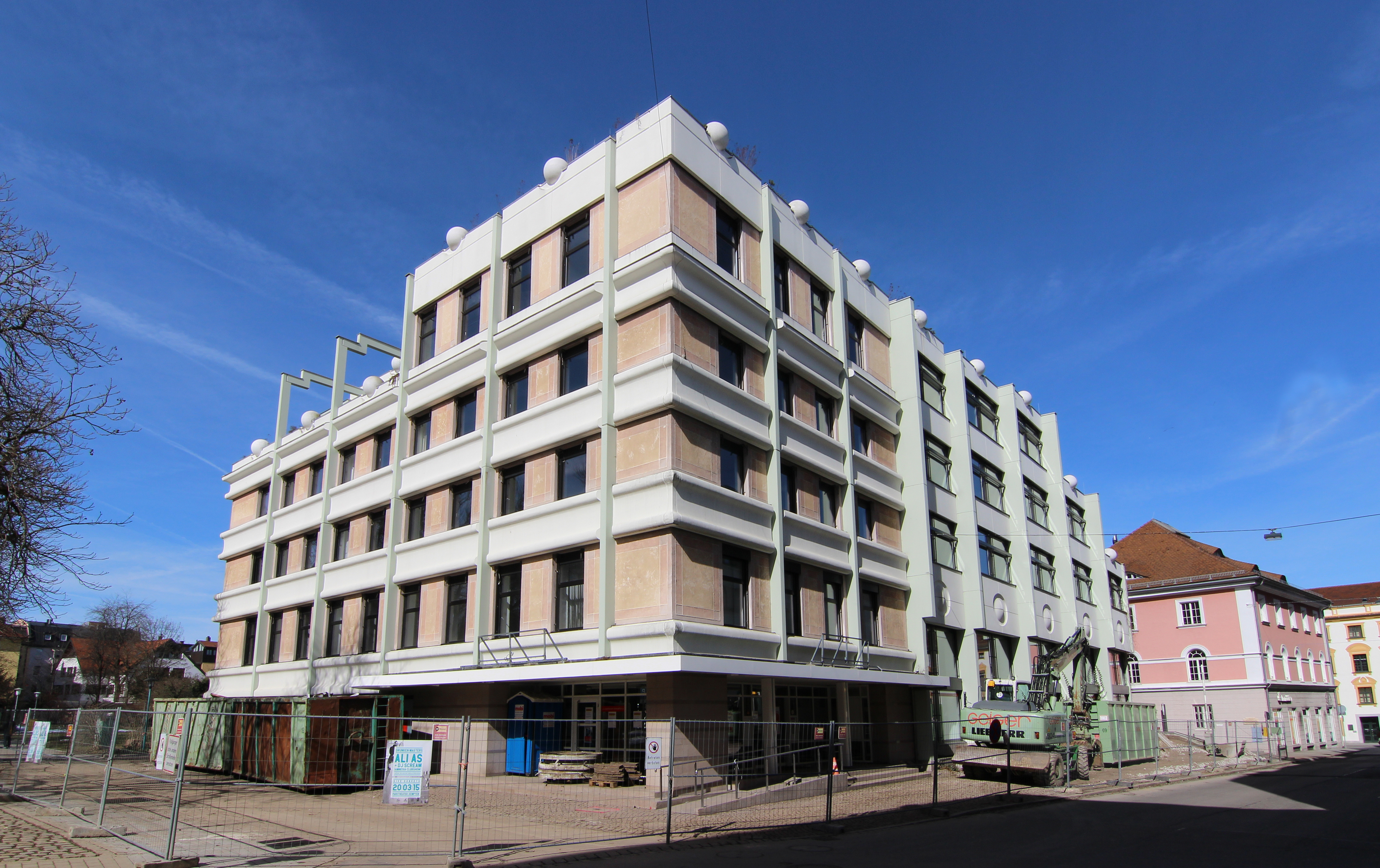 Ehemaliger Geschäftssitz und Verwaltungshaus der Sparkasse Allgäu in Kempten Wird durch Neubau ersetzt